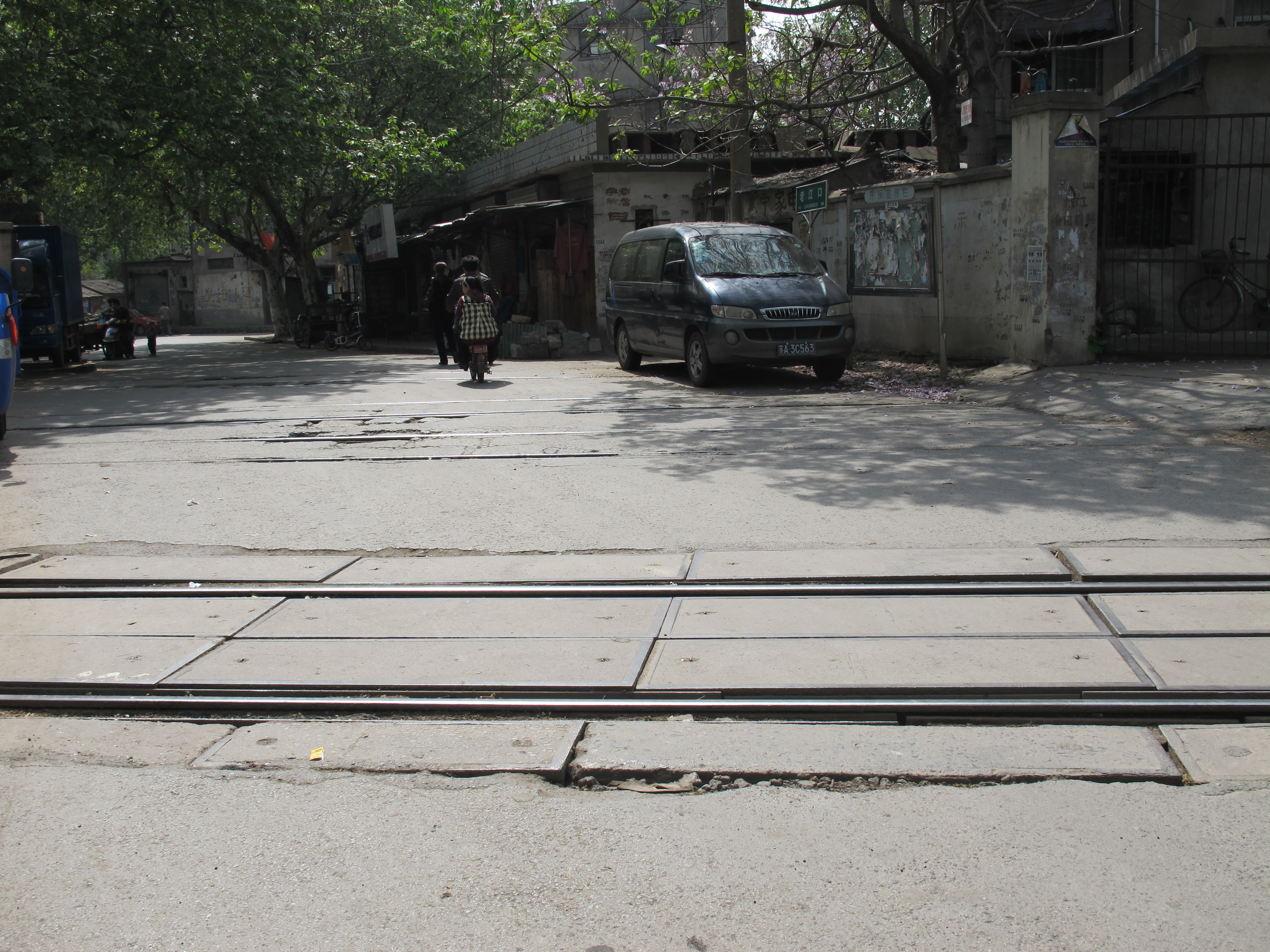 东炮台附近的铁路